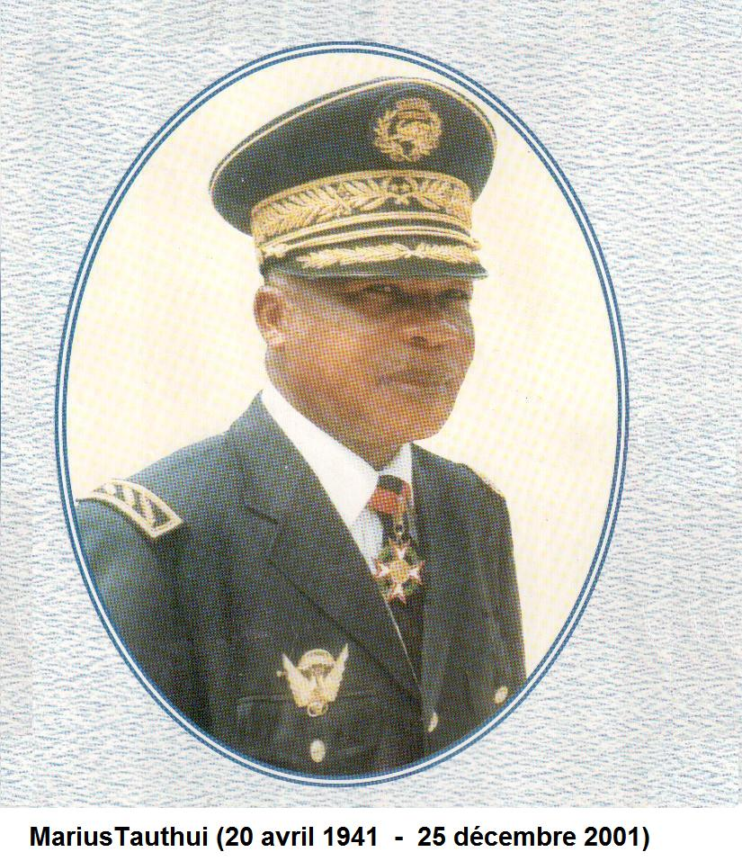 Date anniversaire décès